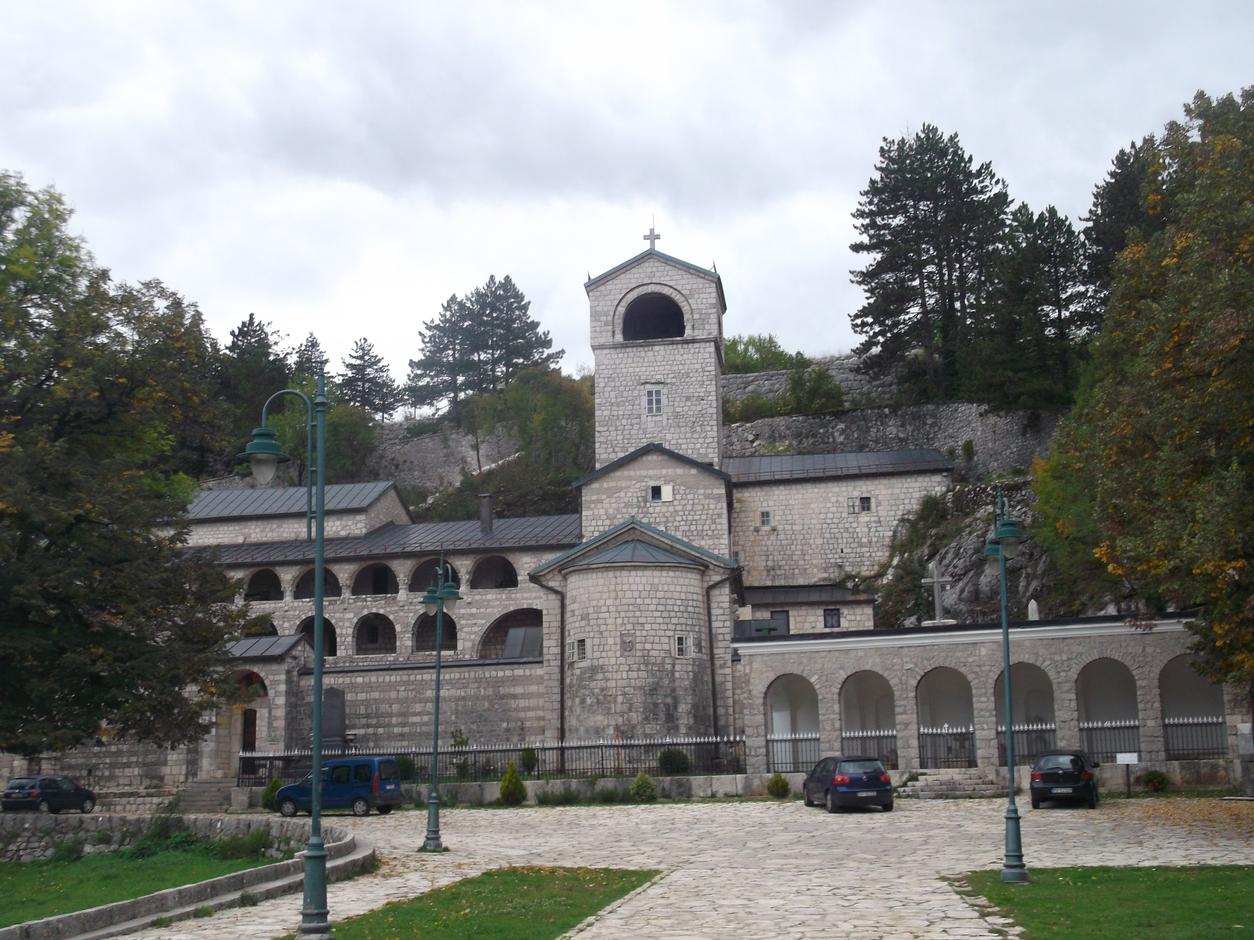 Cetinje, Montenegro